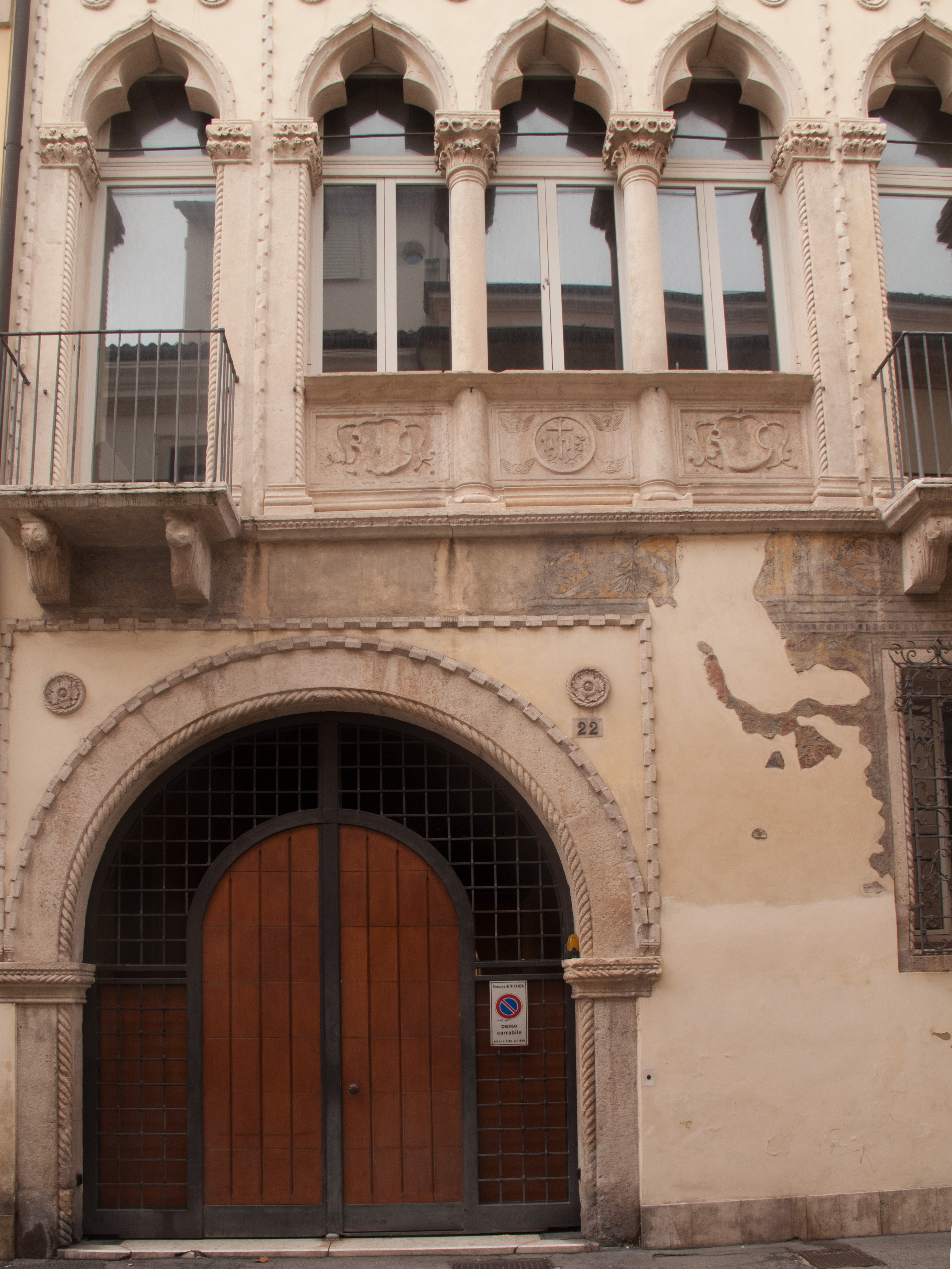 Vicenza -Palazzo Squarzi in contrà Santi Apostoli - portonee trifora